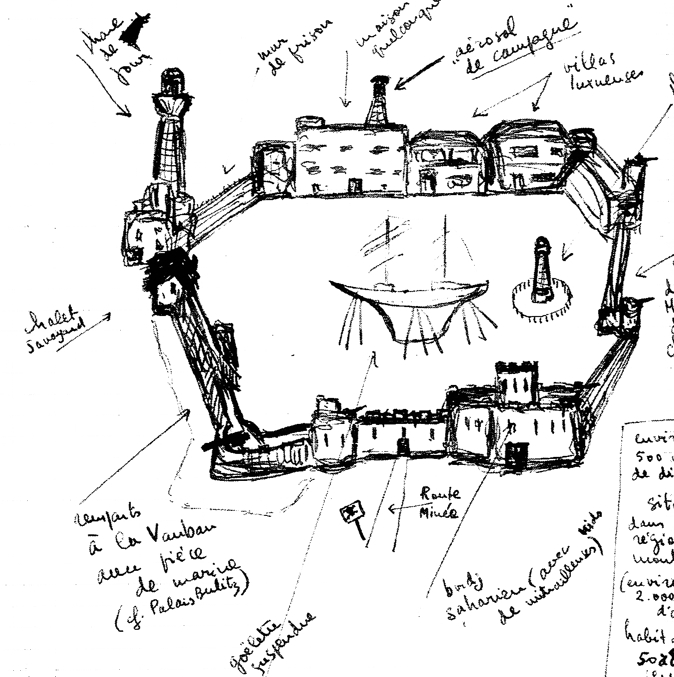 a drawing by Guy Debord